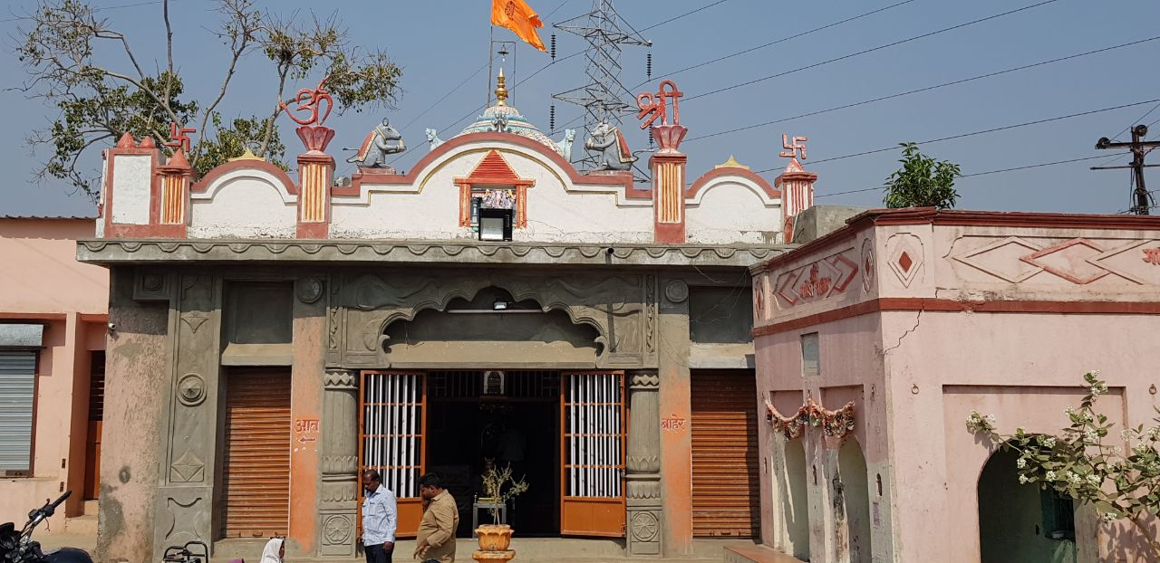 मश्रूम गणपती मंदीर